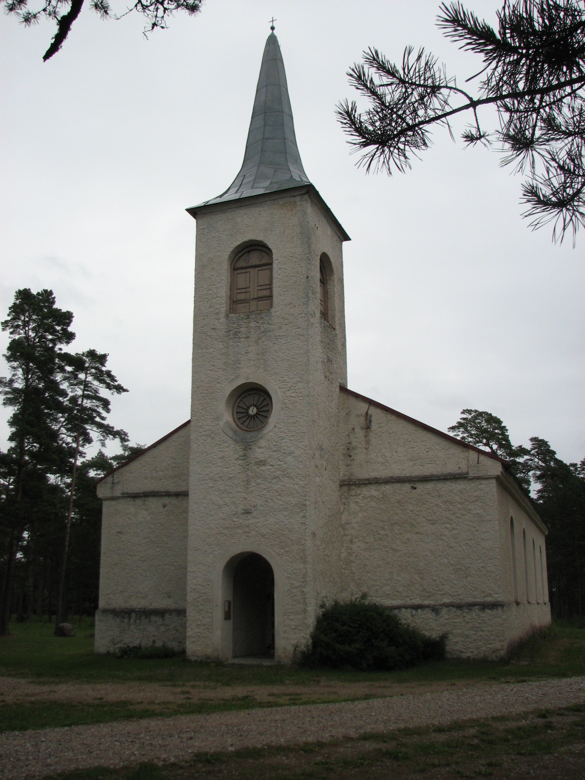 Emmaste Church, Emmaste, Hiiumaa, Estonia. Year 2008